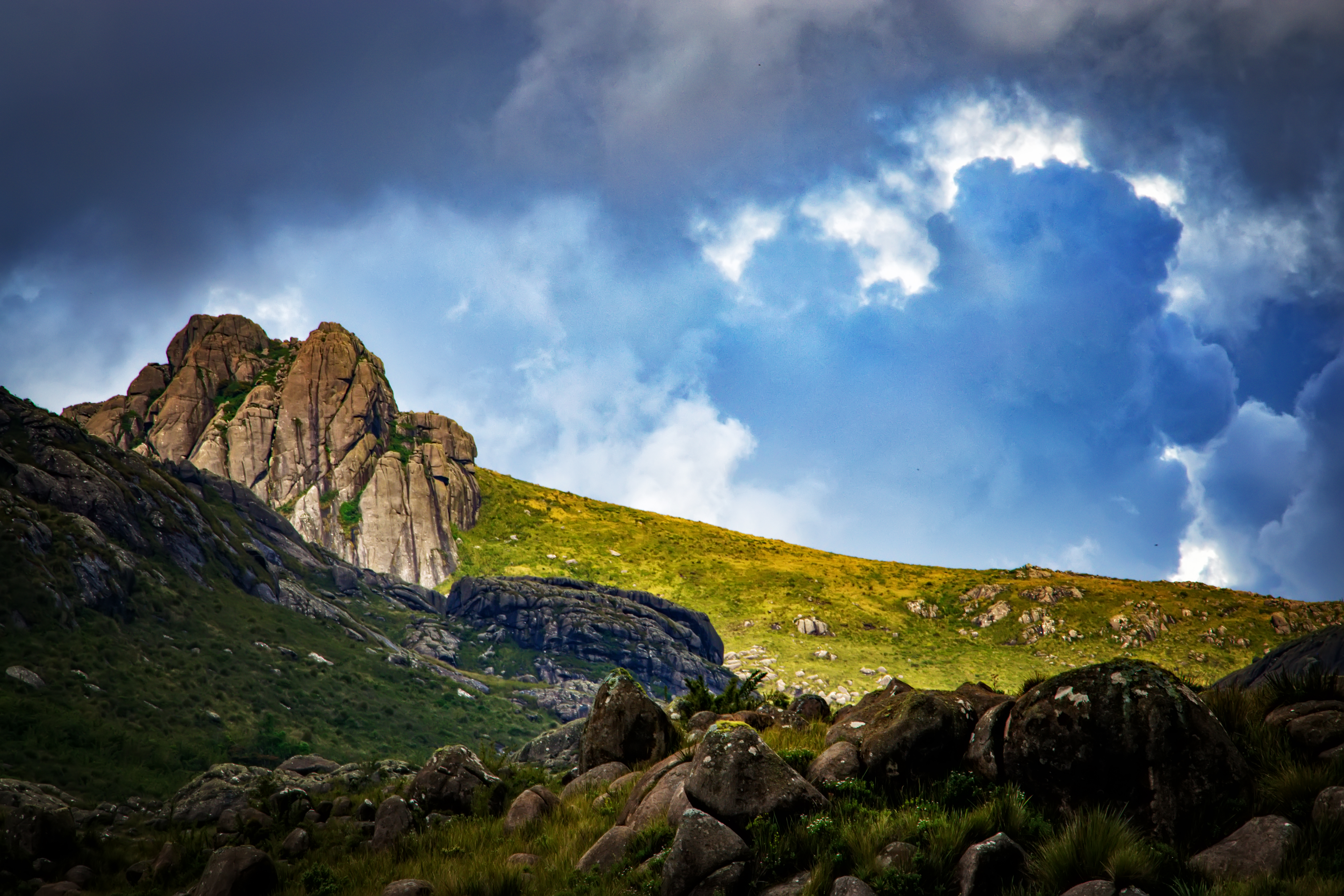 Uma linda vista do acesso ao Pico das Agulhas Negras e as Prateleiras, do Parque Nacional do Itatiaia, na Serra da Mantiqueira